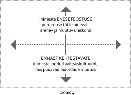 See joonis kirjeldab vabaduse dimensiooni käsitlust sotsiaalse korra teoorias.